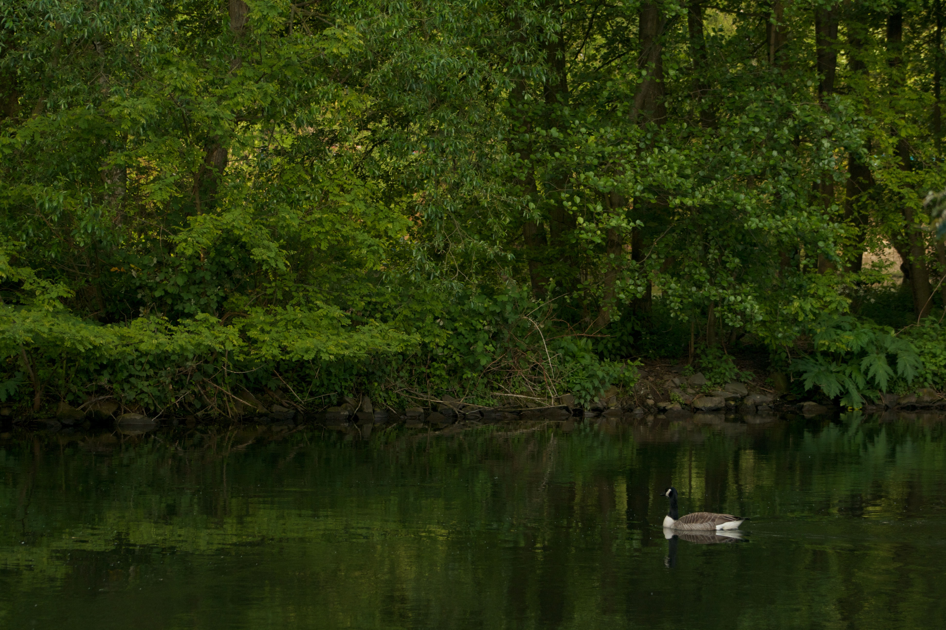 Naturschutzgebiet Heisinger Ruhraue